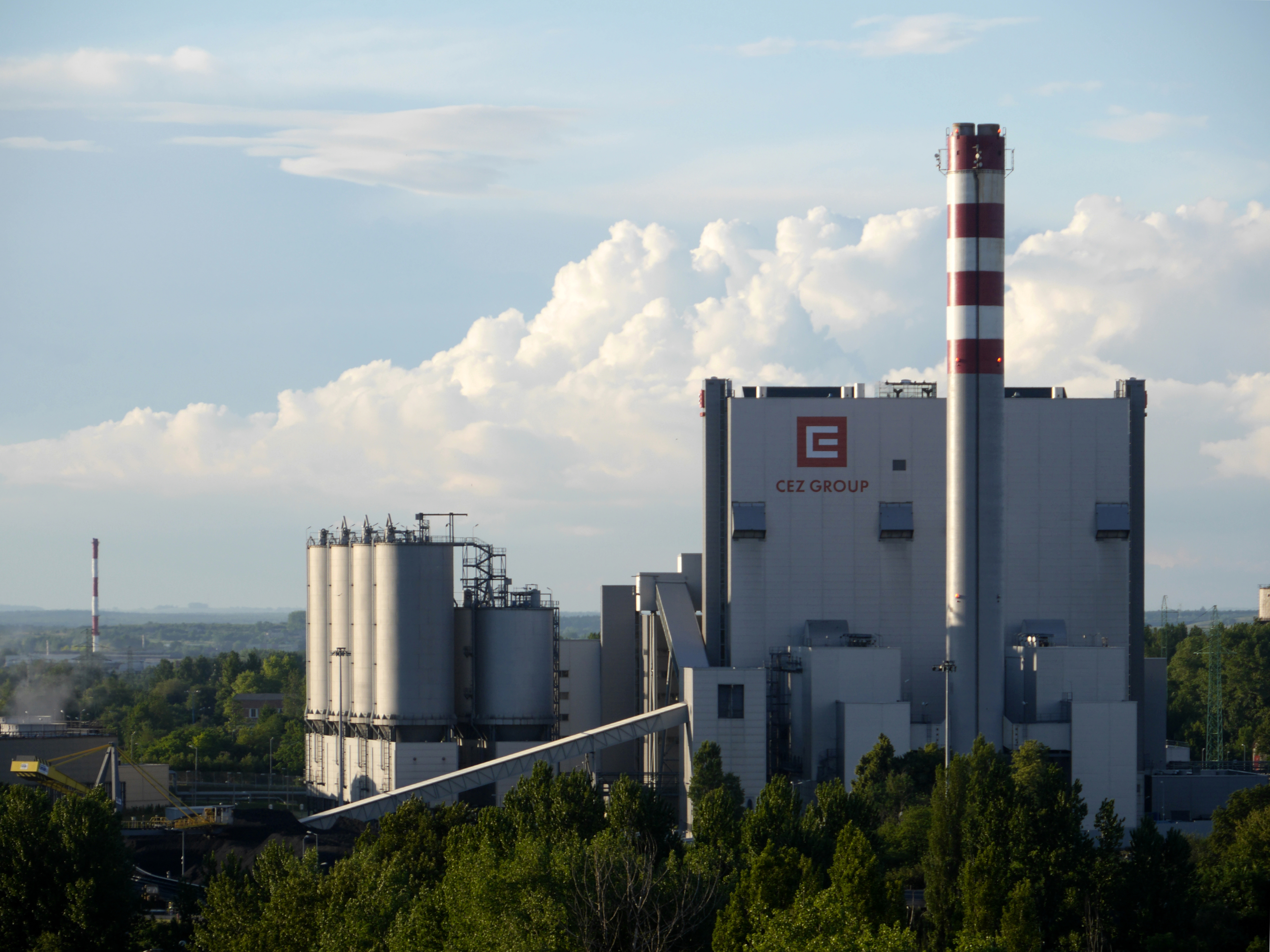 Elektrociepłownia w Chorzowie This image was taken during project Industriada 2014 organized and supported by Wikimedia Polska. English | Esperanto |+/− This photo was taken with Panasonic Lumix DMC-GH3 camera, thanks to Panasonic.You can see all photographs in category: Taken with Panasonic Lumix DMC-GH3.